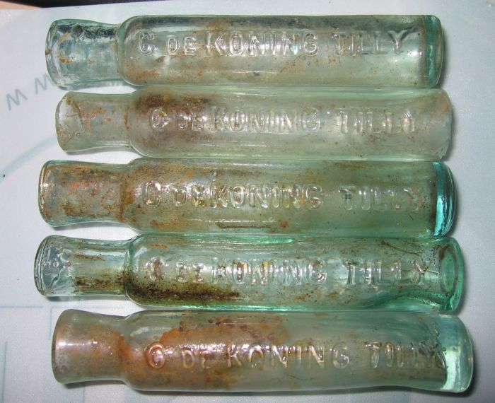 Oude Haarlemmerolie flesjes